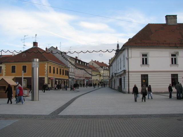 Središte Čakovca